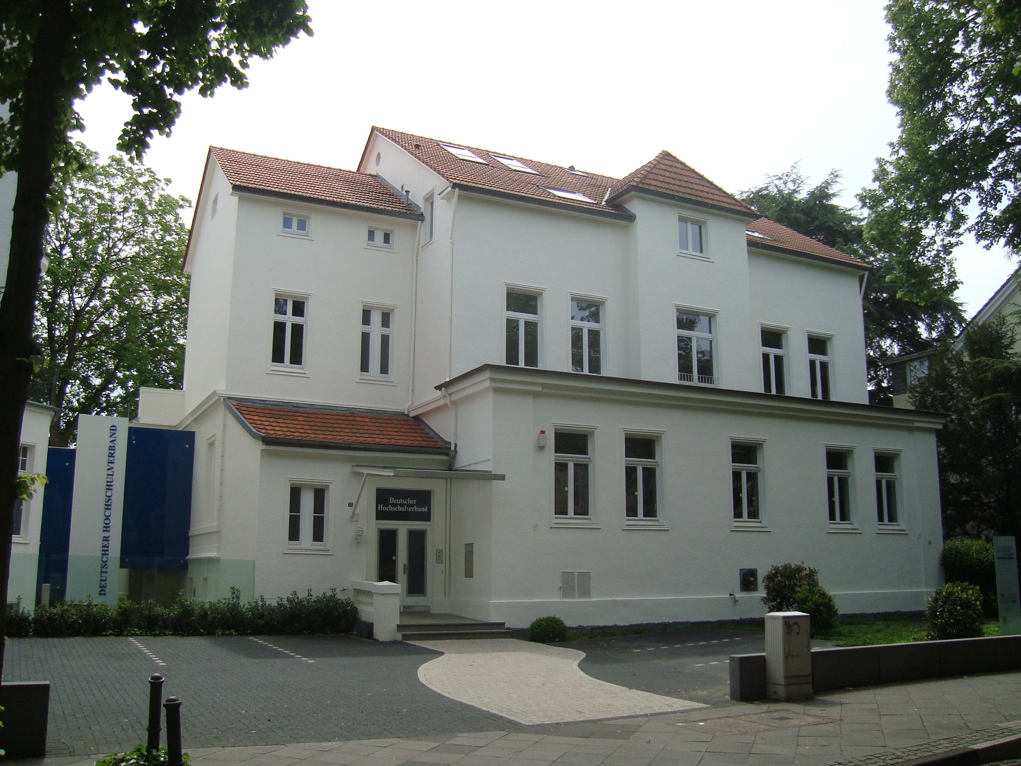 Geschäftsstelle des Deutschen Hochschulverbandes, Rheinallee 18, Bad Godesberg